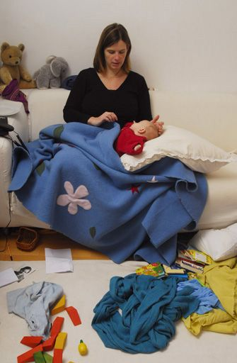 Mutter mit Baby